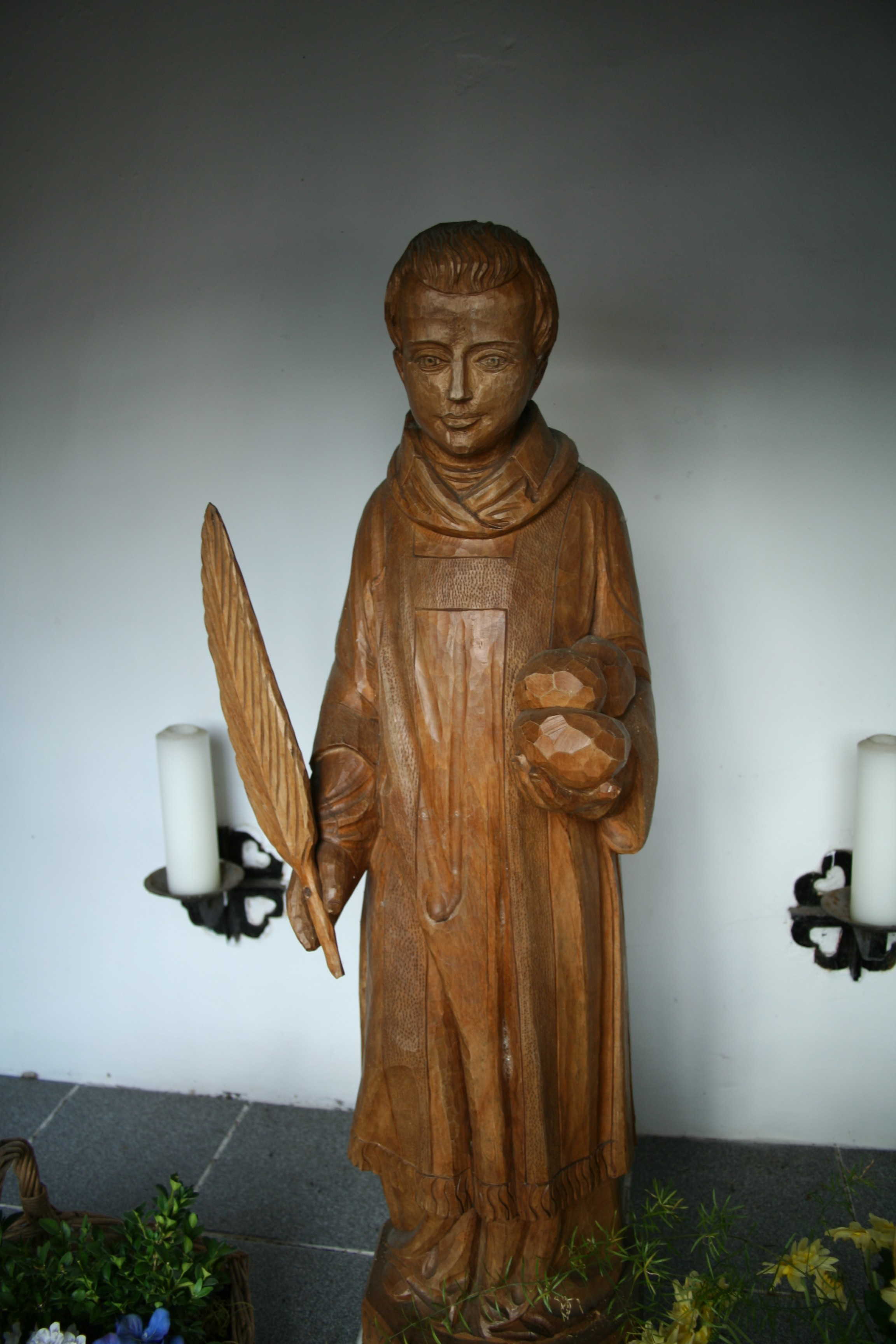 St. Stephanus, Kessel, Goch, NRW, Germany